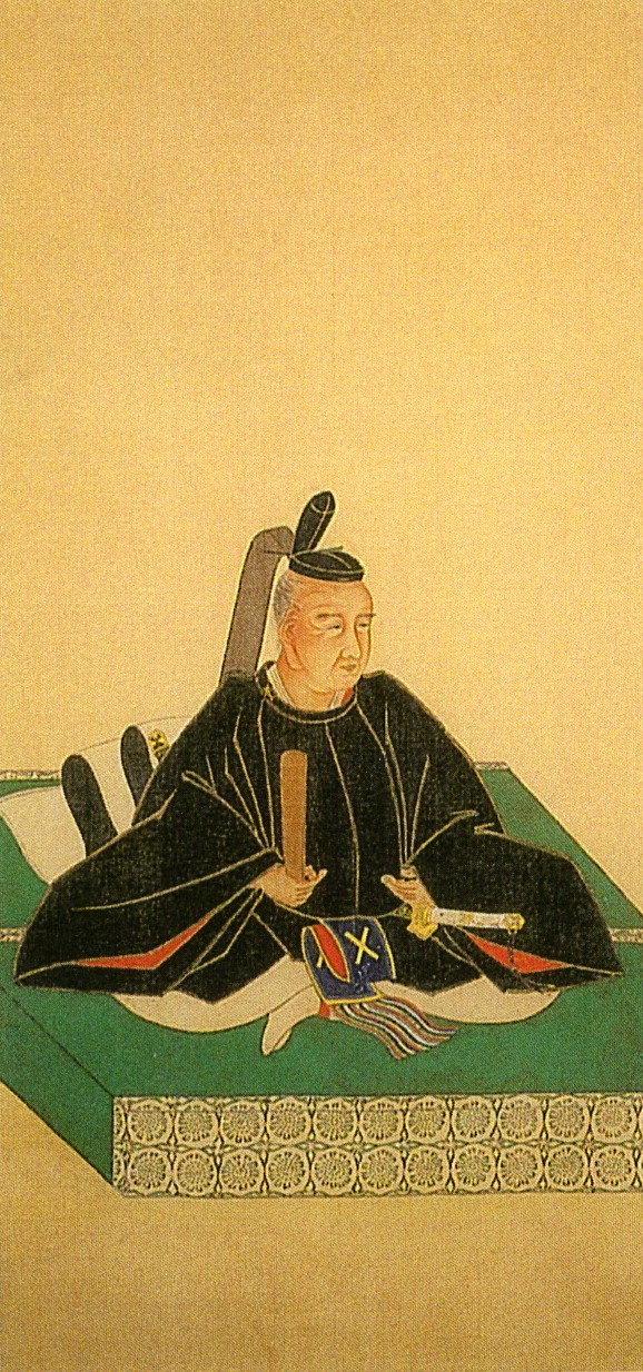 丹羽秀延の肖像画(市指定文化財)。